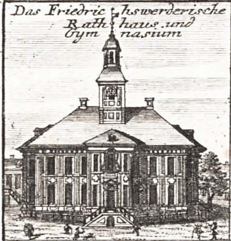 Ansicht des Friedrichswerderschen Rathauses auf dem Friedrichswerder.